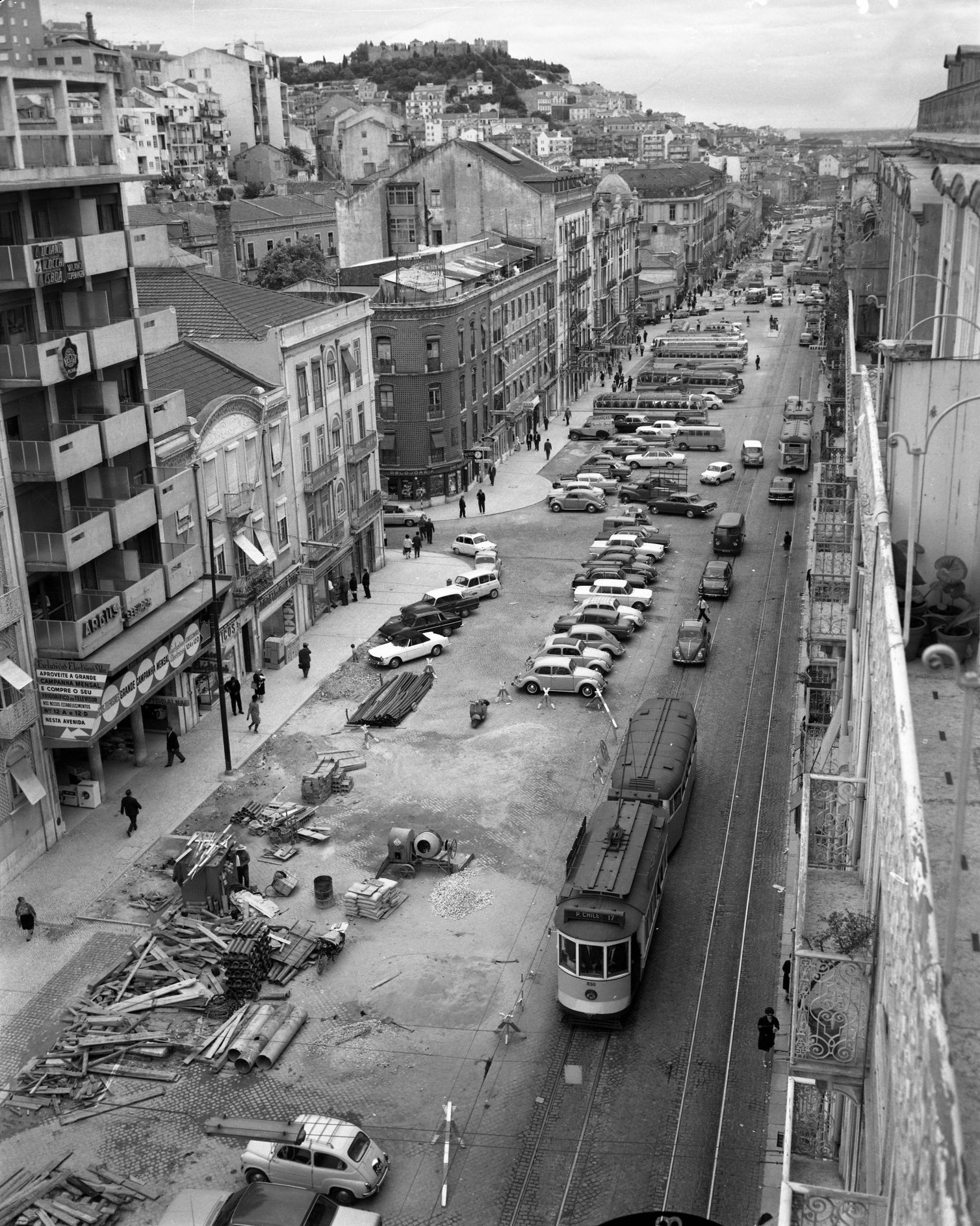 Bondes de Lisboa